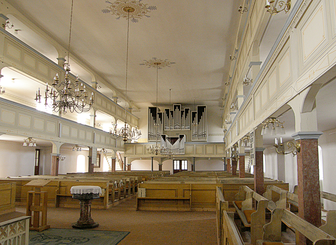 Die Kirche in Burg (Spreewald)